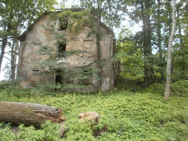 Vana mõis linnuse loodenurgas lääne poolt vaadatuna. Mõisahoone peaks jääma juba linnusealalt väljapoole.